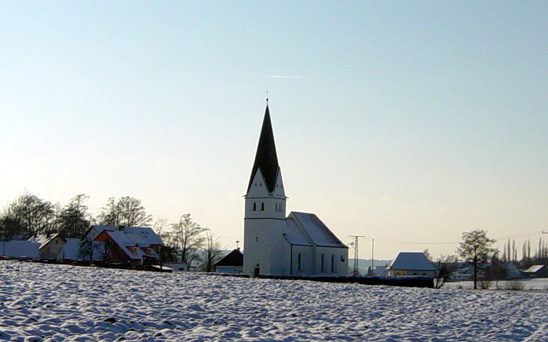 Kirche Sankt Nikolaus in Paindorf